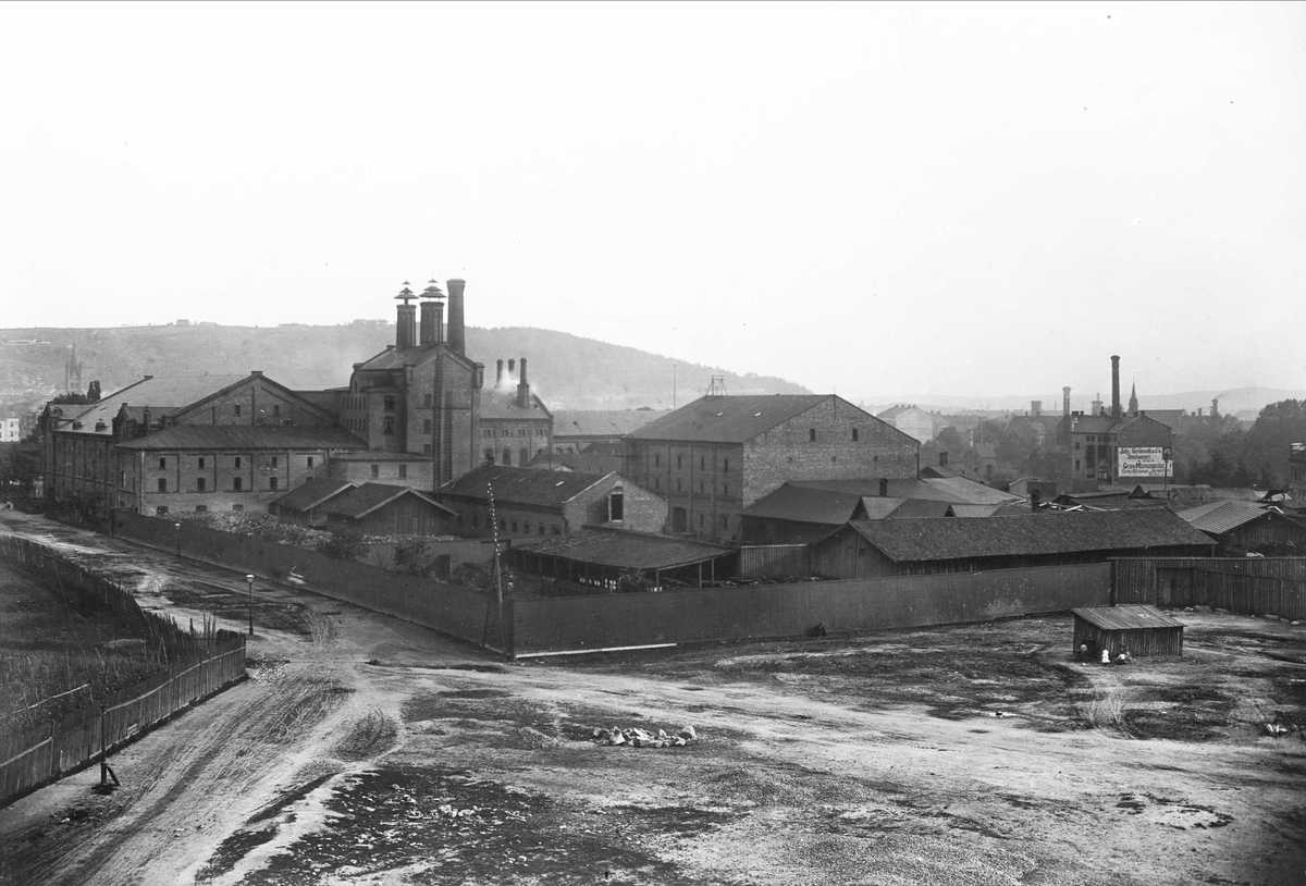 Schous bryggeri - ca. 1880